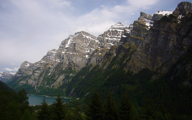 Klöntal scheinbar schneefrei bis Waldgrenze